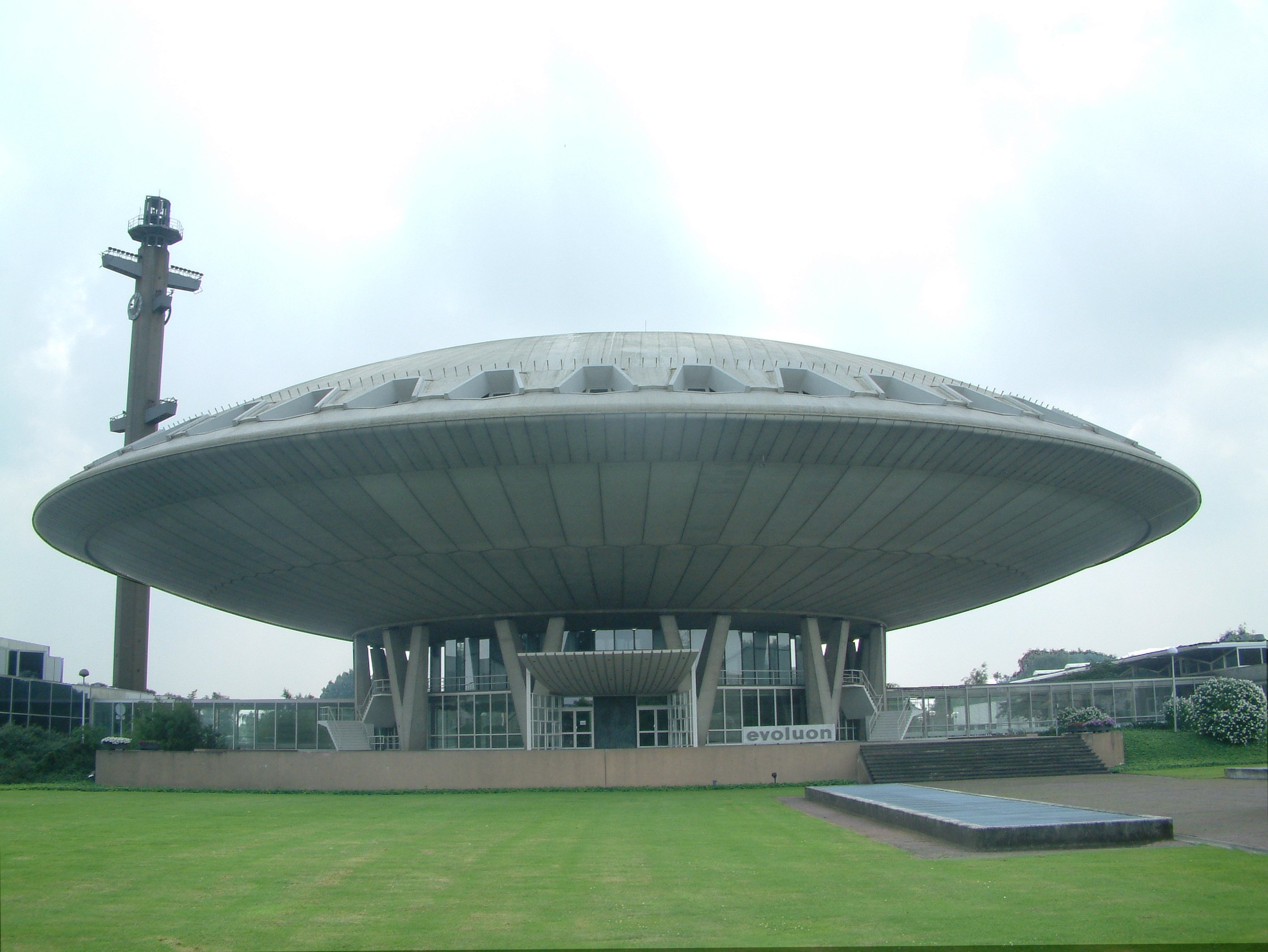 Het Evoluon in Eindhoven Its number in the list of 89 proposed monuments is: 2013-75 For more information see Dutch WIkipedia: 89 topmonumenten uit de periode 1959-1965